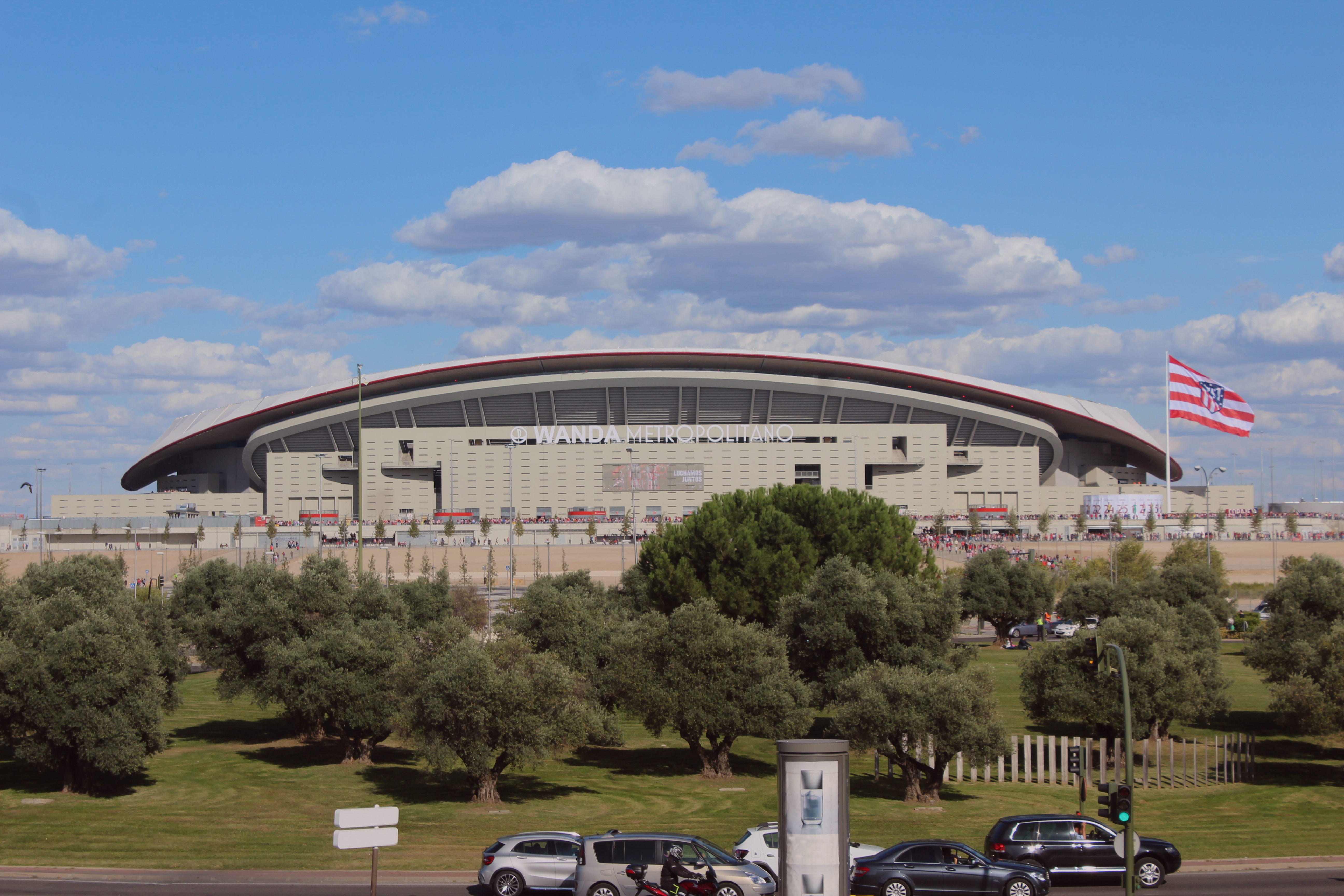 Wanda Metropolitano - Canon EOS 1200D, Septiembre de 2017. f/11 1/250 s ISO-100 - sRGB - 49mm Distancia focal